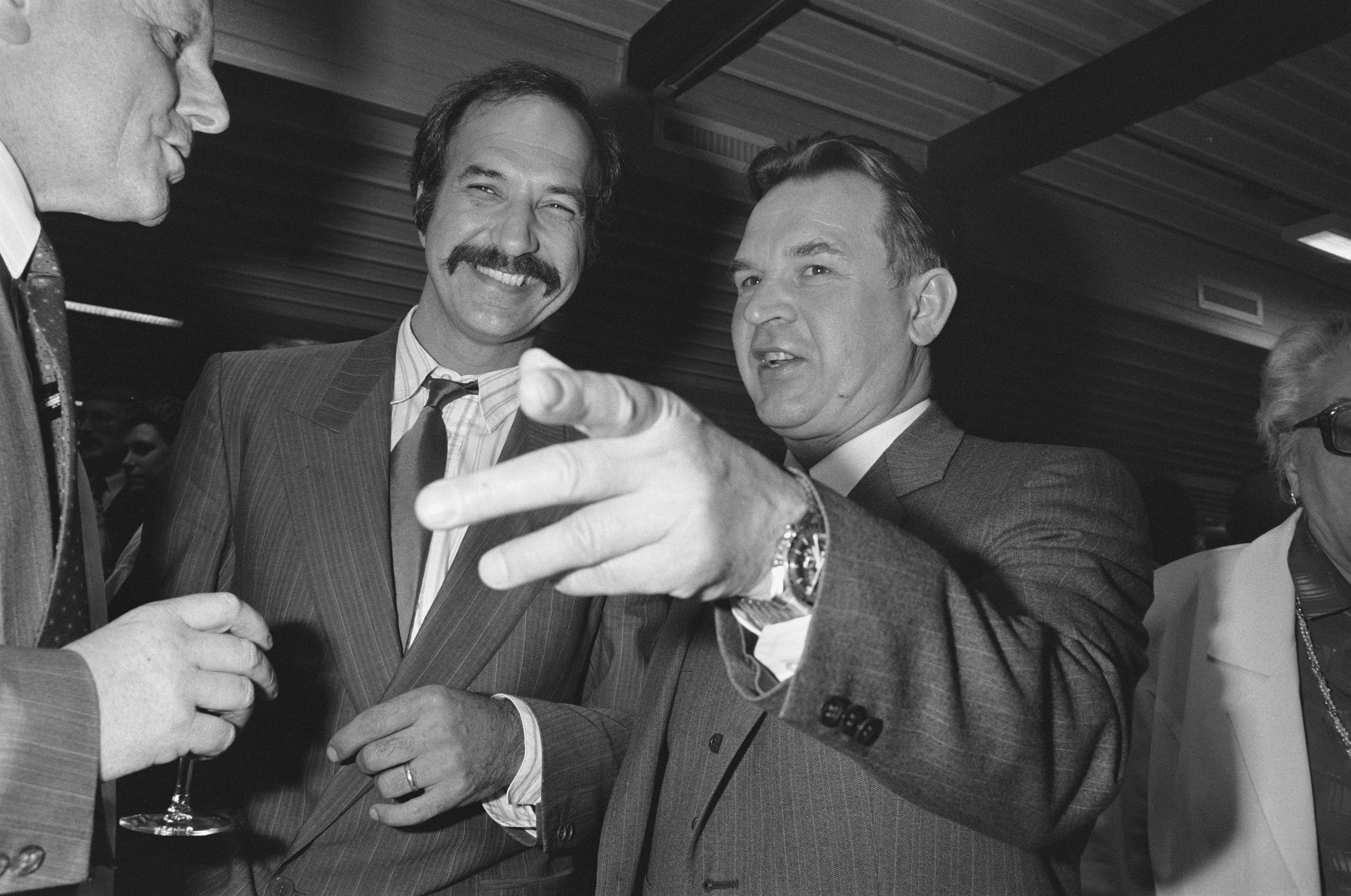 Collectie / Archief : Fotocollectie Anefo Reportage / Serie : [ onbekend ] Beschrijving : Opening Planetarium in Artis; Ockels en Koebasov (r) Datum : 2 mei 1988 Locatie : Amsterdam, Noord-Holland Trefwoorden : Openingen, PLANETARIUM, astronauten Persoonsnaam : Koebasov, Valeri, Ockels, Wubbo Instellingsnaam : Artis Fotograaf : Croes, Rob C. / Anefo Auteursrechthebbende : Nationaal Archief Materiaalsoort : Negatief (zwart/wit) Nummer archiefinventaris : bekijk toegang 2.24.01.05 Bestanddeelnummer : 934-2415